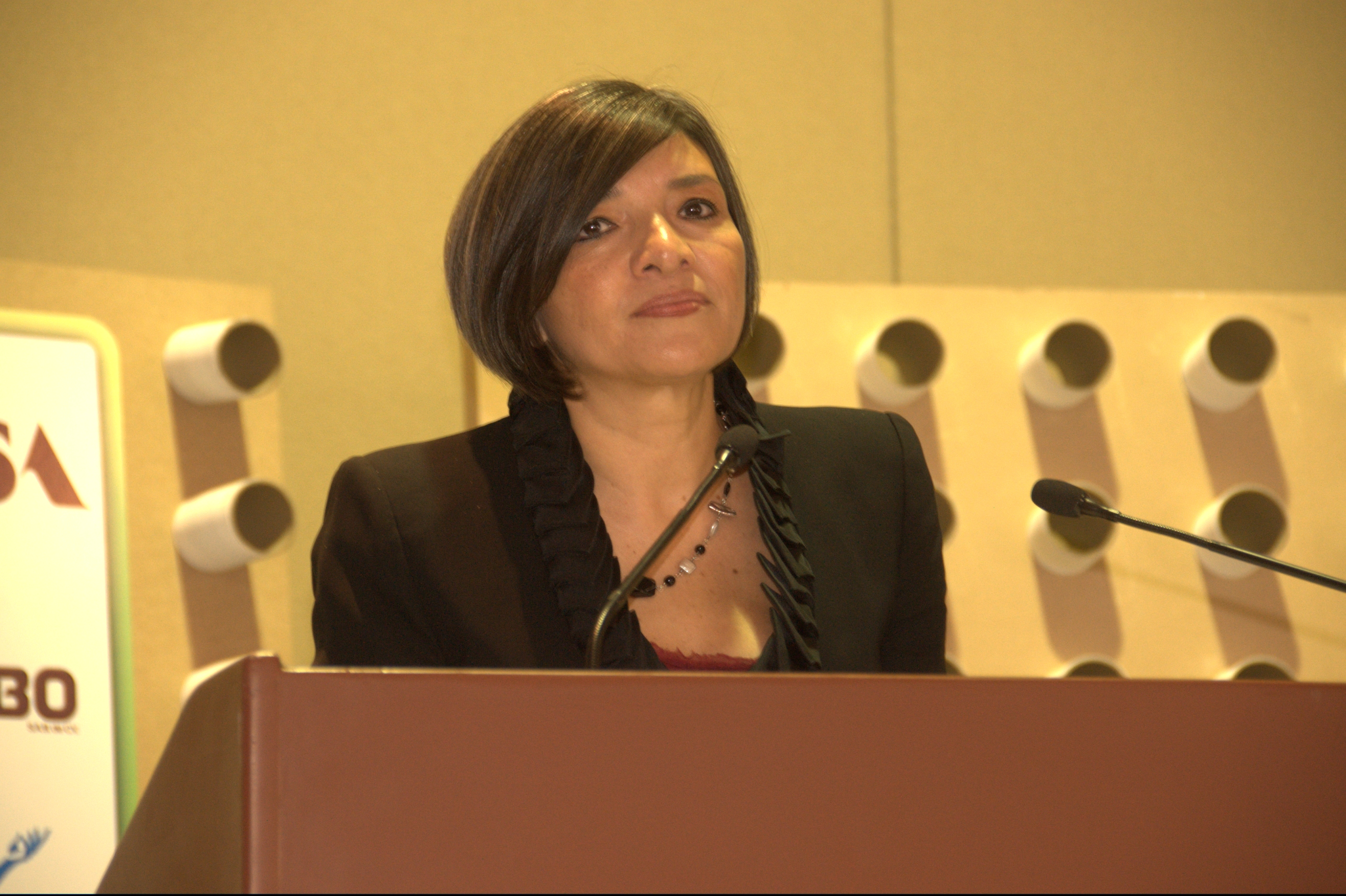 Isabel Studer en la inauguración del Cumbre de Negocios Verdes del Instituto Global de Sostenibilidad en el ITESM-Campus Ciudad de Mexico